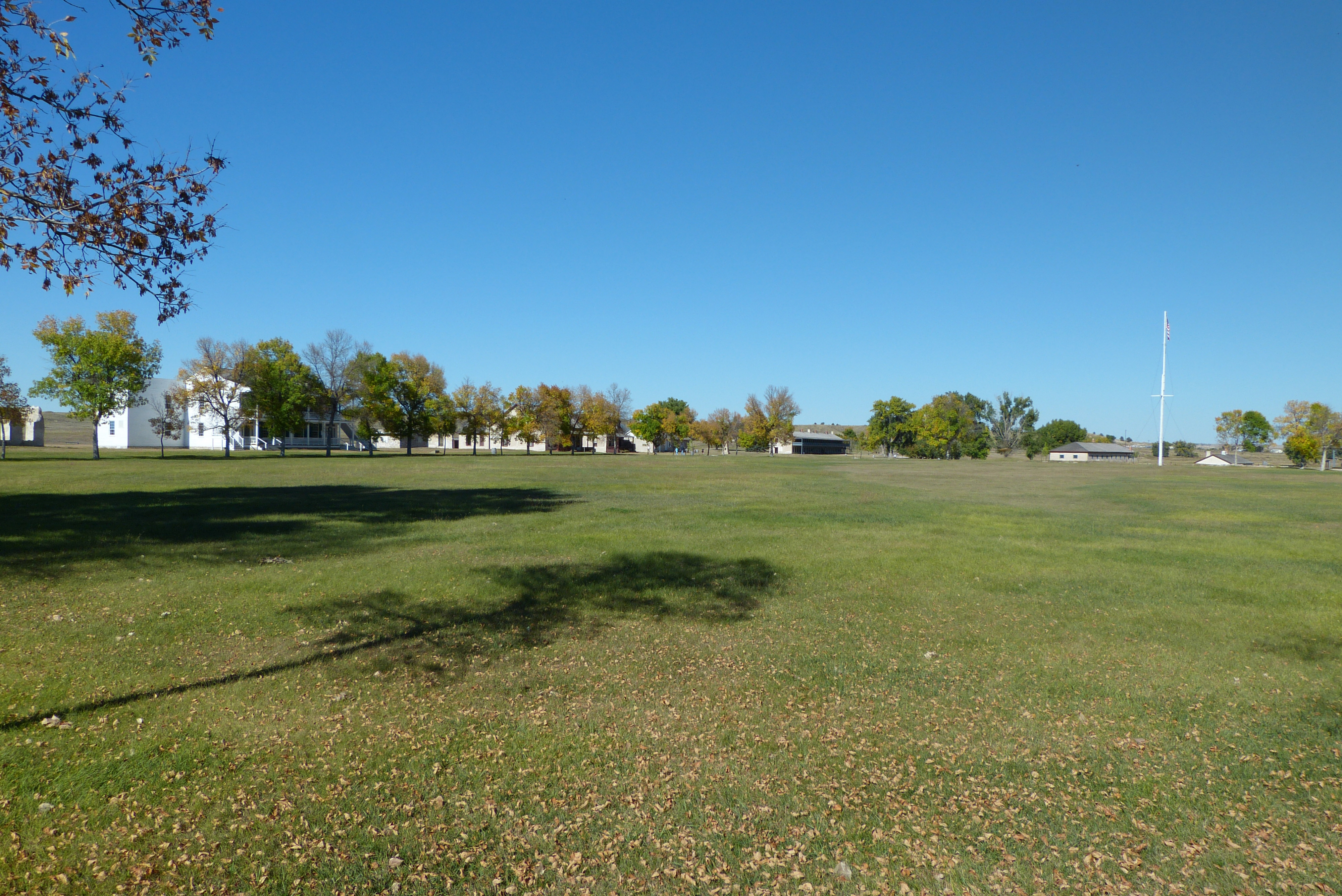 Blick über den Apellplatz, dem ursprünglichen Standort von Fort John.